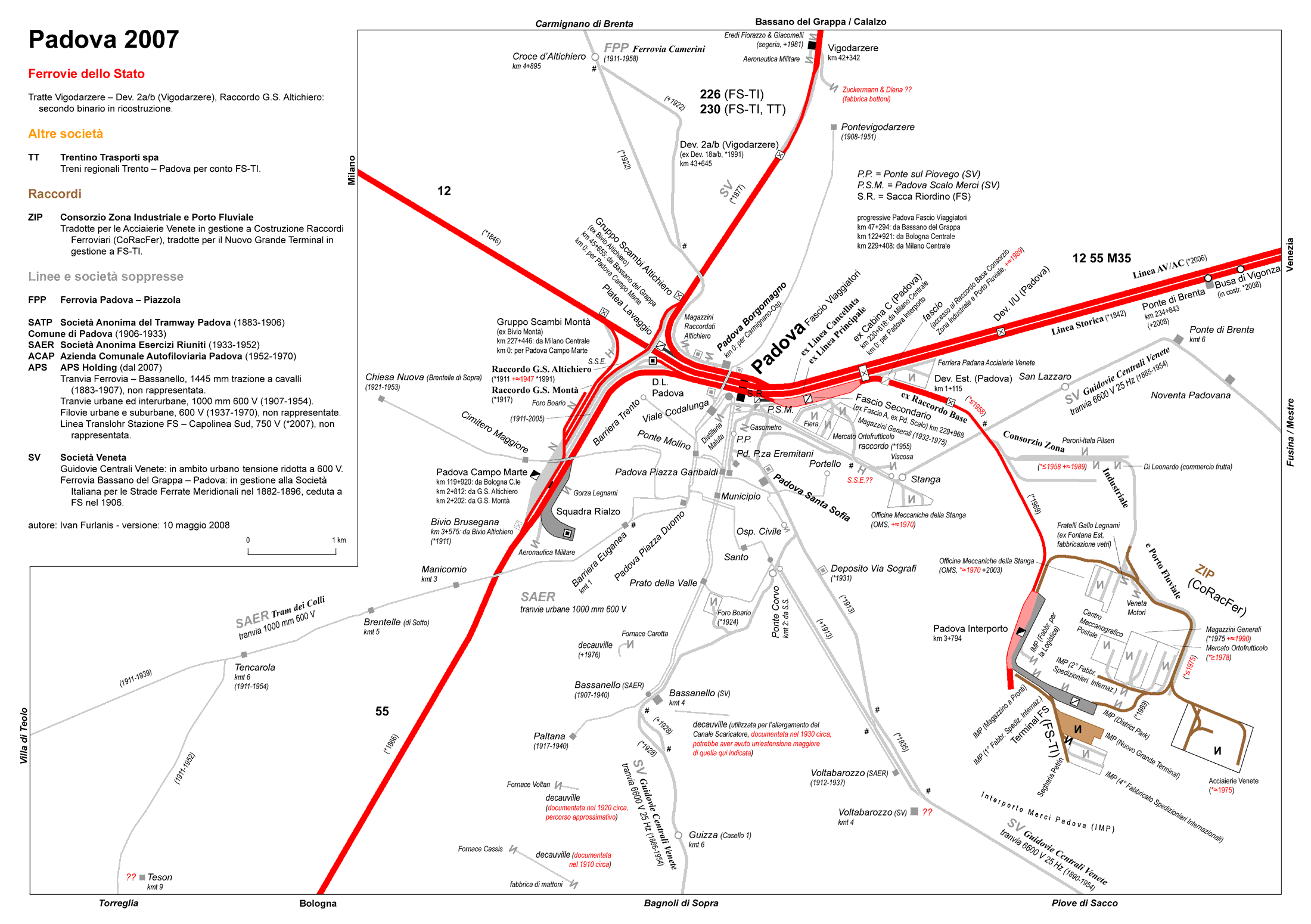 Mappa ferroviaria e tranviaria di Padova. Legenda.